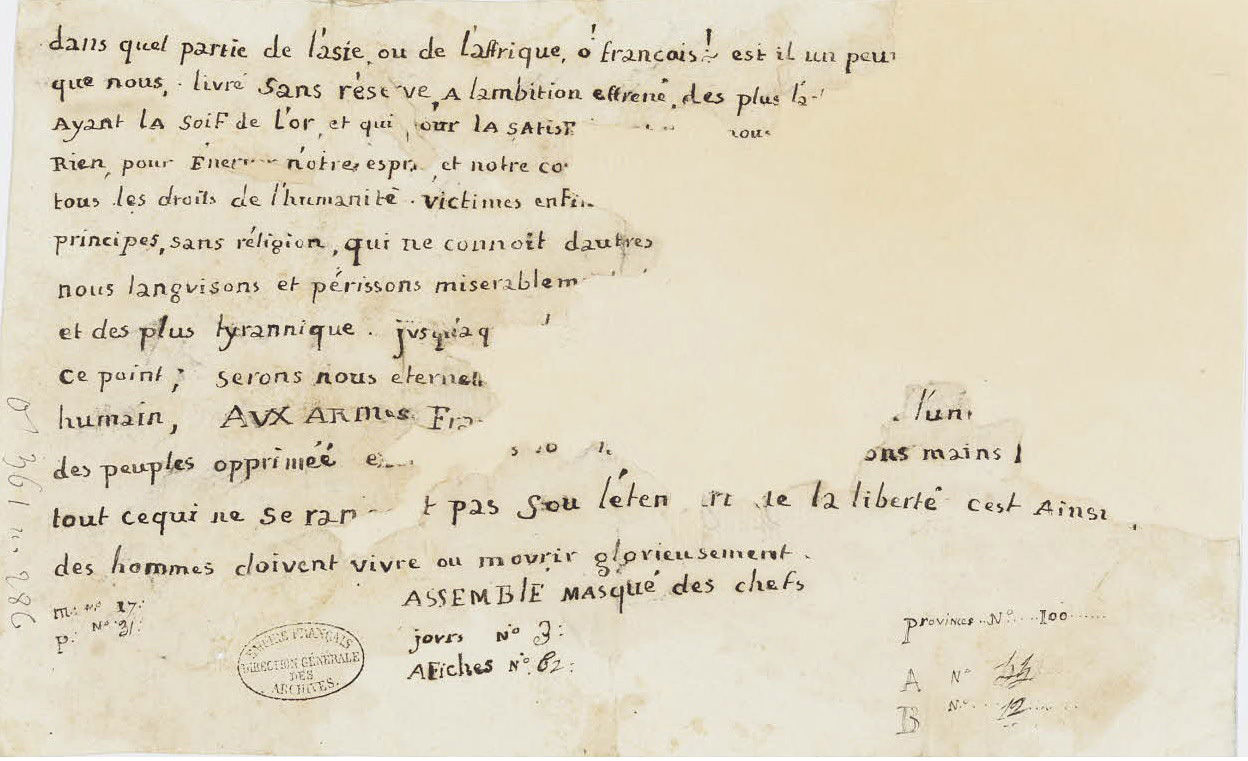 Placard de propagande, trouvé aux Champs– Élysées, s’élevant aux noms des droits de «l’humanité» contre l’oppression et pour la liberté